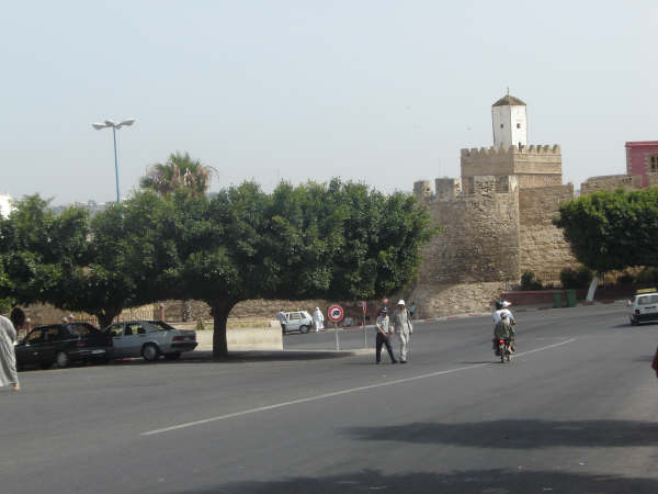 de loin, on voit la grande mosquée de safi, elle est située au centre de l'ancienne médina qui est entourée d'un gigantesque mur datant de lair portugaise.